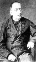 Krzysztof Szwernicki